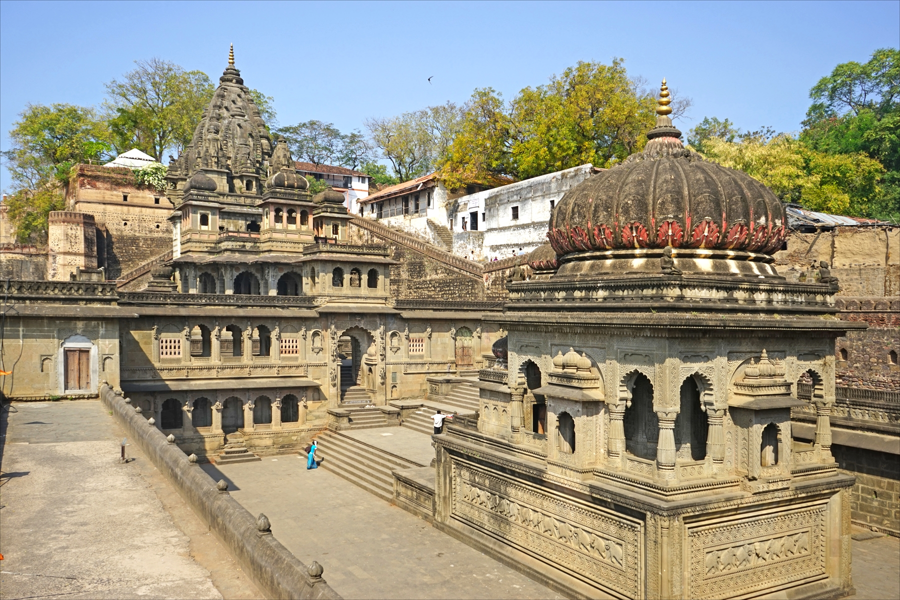 Le fort et les temples de Maheshwar au bord du fleuve Narmada, au premier plan un cénotaphe Maheshwar est une ville de l'état de Madhya Pradesh, dans le centre de l'Inde sur la rive nord de la rivière Narmada, qui est un fleuve sacré pour les hindous. De nombreux pèlerins et des sadhu se rendent ou vivent sur les ghats de Maheshwar et dans les temples qui s'y trouvent. Le fort renferme plusieurs temples dédiés à Shiva ainsi que le palais, édifiés par la reine Ahilyabai Holkar (1767-1795), qui est vénérée dans la région comme une sainte. Un hôtel a été ouvert dans le fort par le descendant de la dynastie Holkar. Article de Wikipedia sur Maheshwar